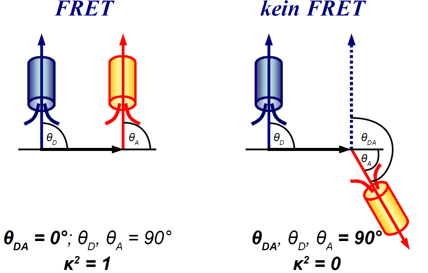 Voraussetzungen für einen Förster-Resonanzenergietransfer. Parallele Schwingungsebenen.